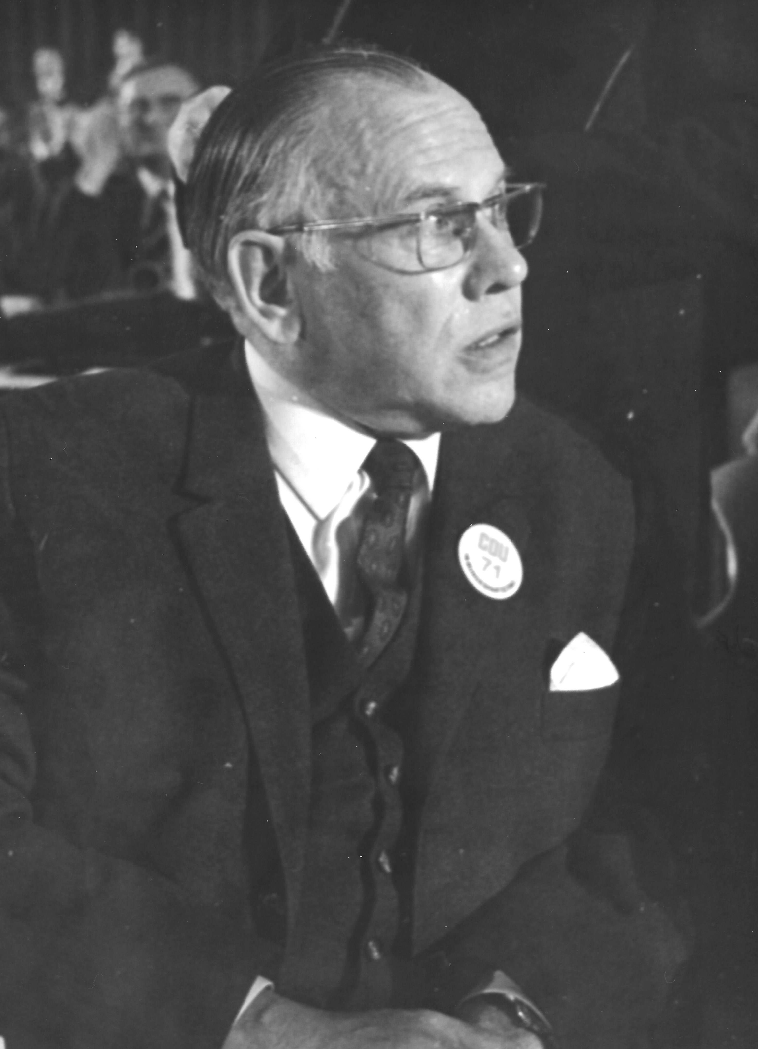 Eugen Gerstenmeier; CDU-Bundesparteitag 1971 in Düsseldorf